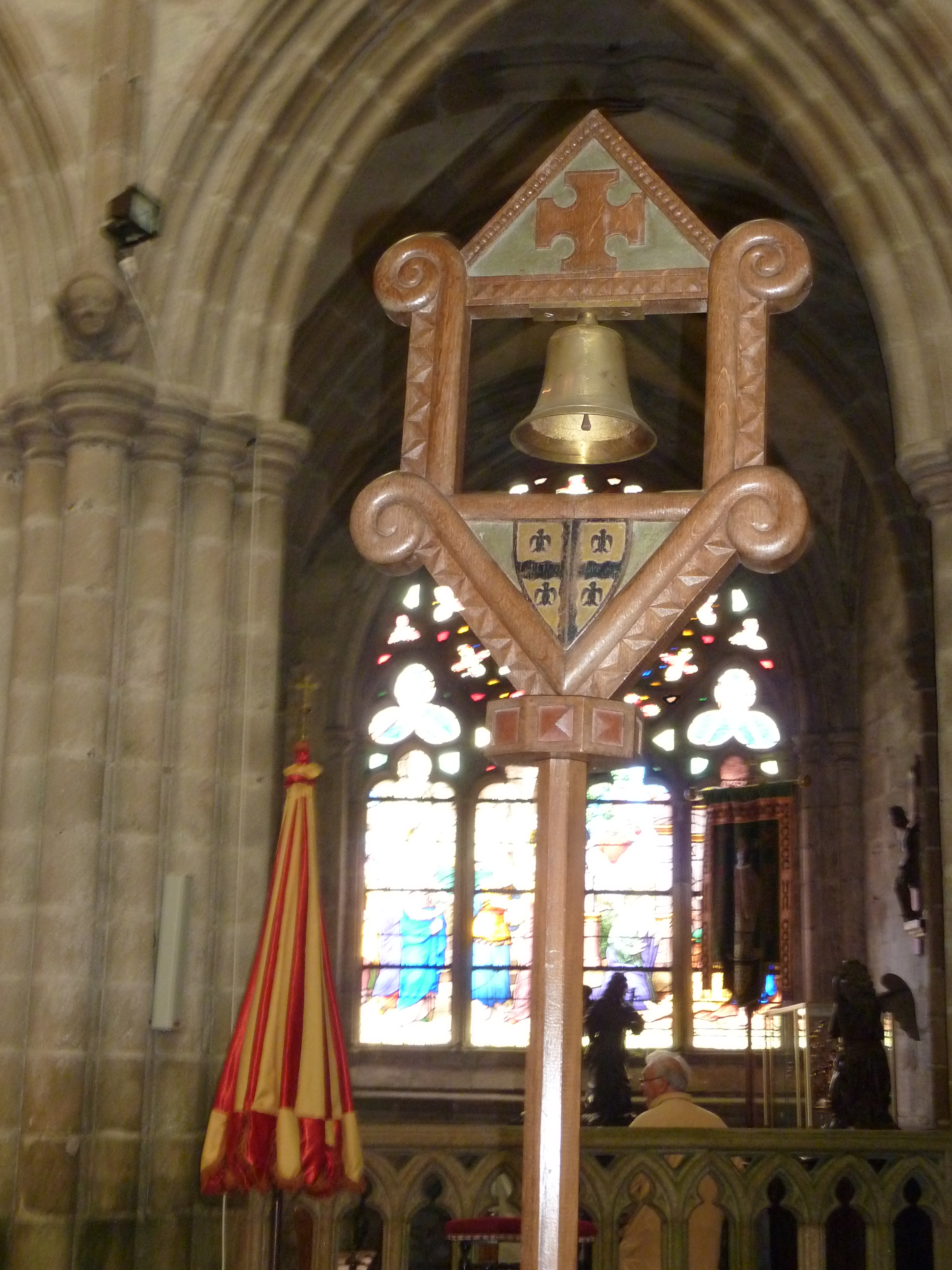 Cathédrale Saint-Tugdual de Tréguier (Côtes-d'Armor) : les insignes d'une basilique, le pavillon (ombrellino) et le tintinnabulum